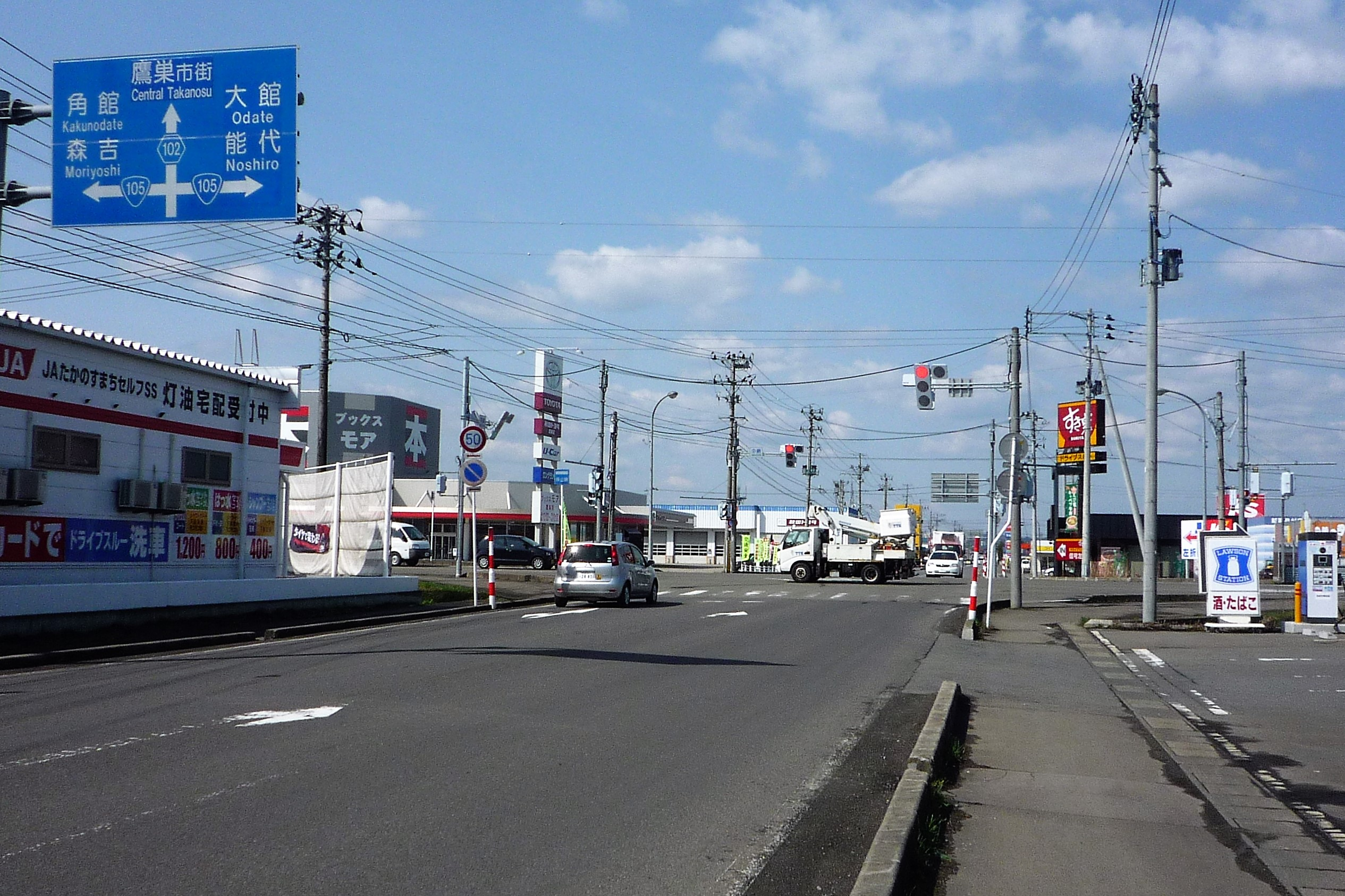 秋田県道102号大館鷹巣線 中綱交差点（秋田県北秋田市）